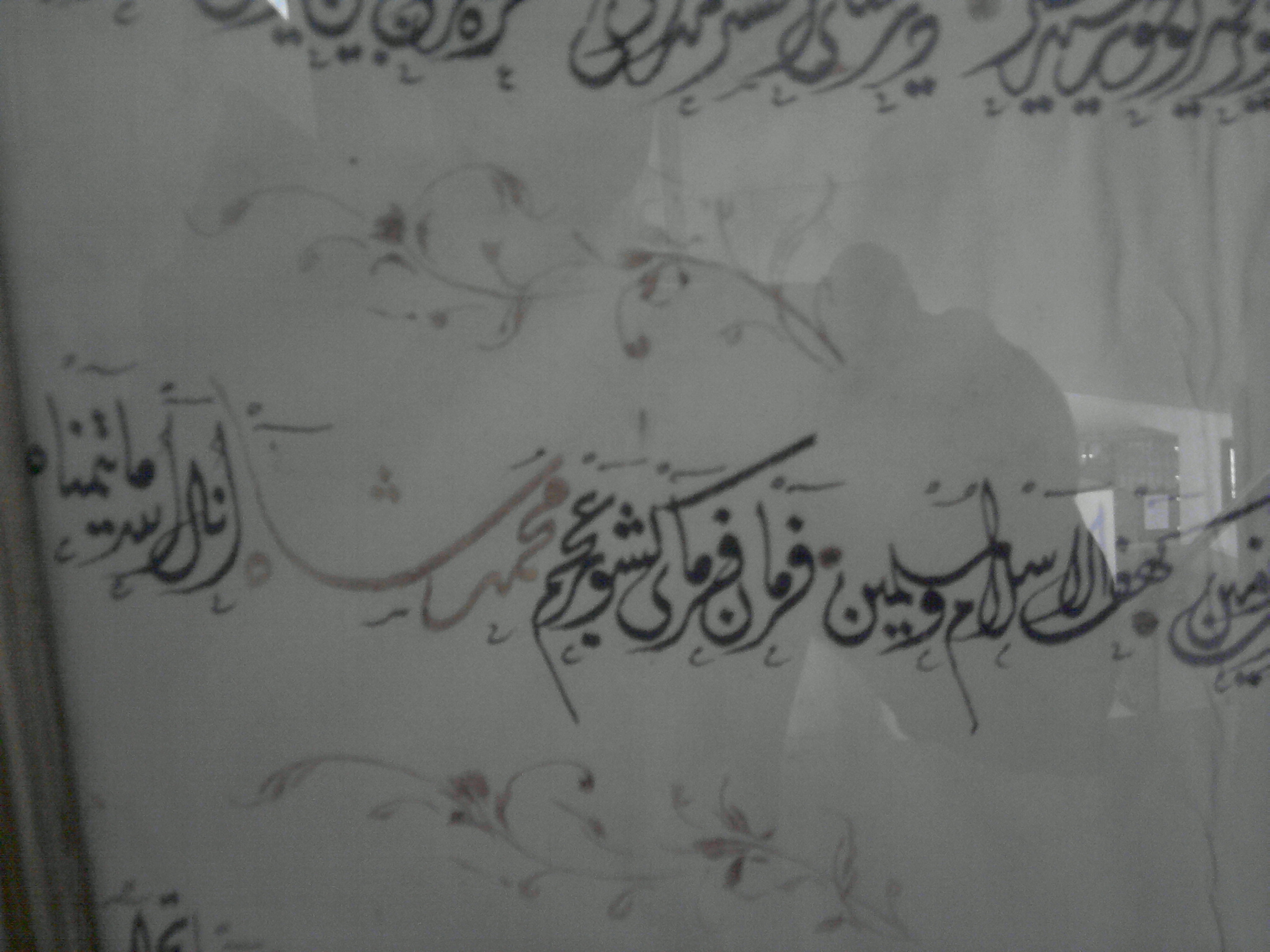 To the Emperor of(Keshvar Ajam) =Keshvar means the land and Ajam means Persia. the land of Persia.